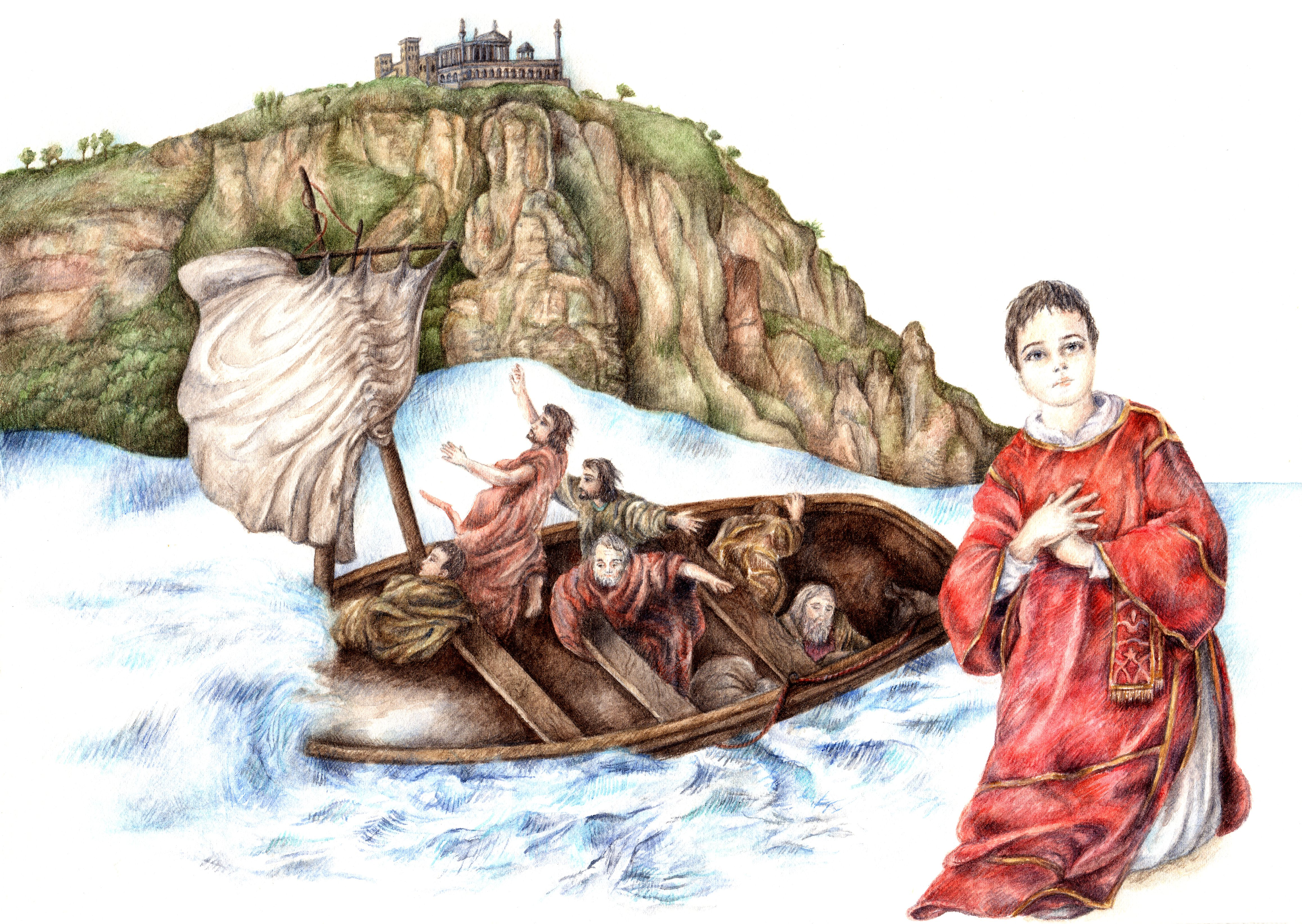 Superata la fase dell’adolescenza, il diacono Cesario decide di partire, con i suoi compagni, alla volta di Roma, dove il Cristianesimo è una religione illecita punibile con le massime pene. La nave tuttavia naufraga - a causa di una furiosa tempesta - sulle coste di Terracina, una città a poca distanza dalla capitale Roma. Sullo sfondo vi è "Pisco Montano" ed Monte Sant'Angelo di Terracina sulla cui vetta domina il tempio di Giove Anxur (ricostruzione ipotetica).